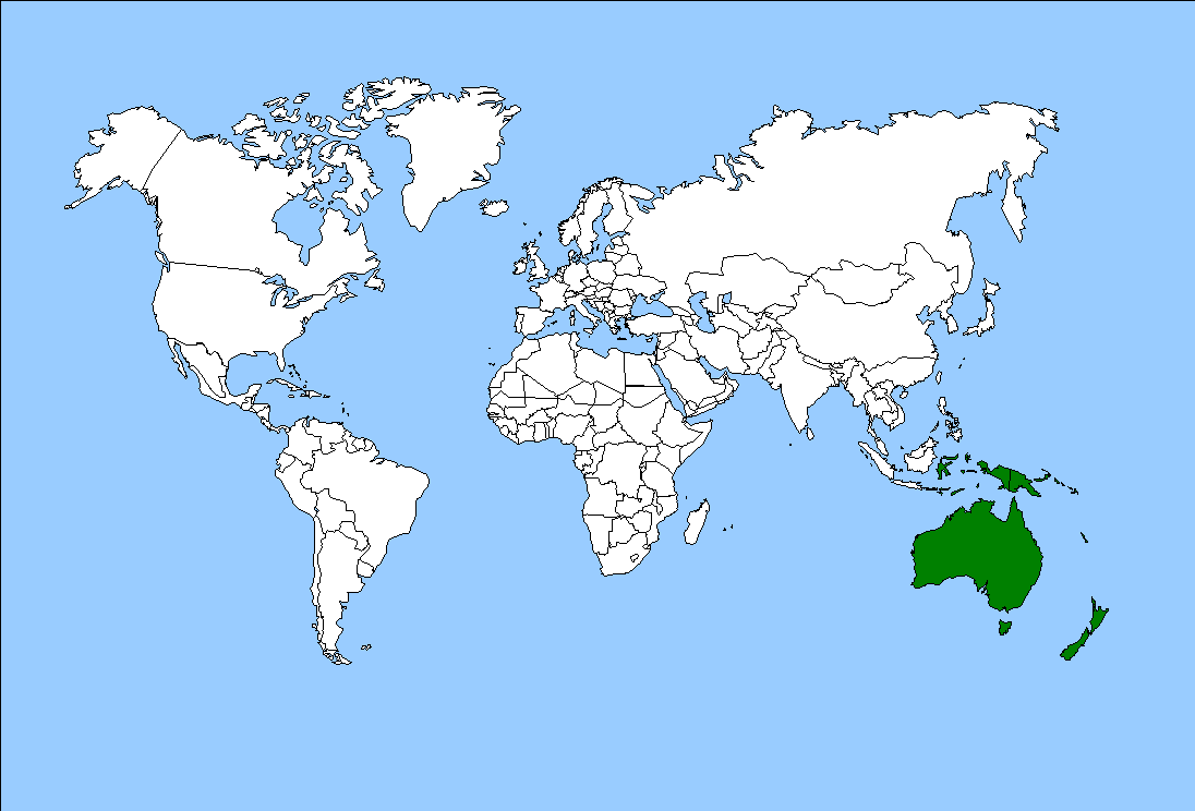 écozone australasienne